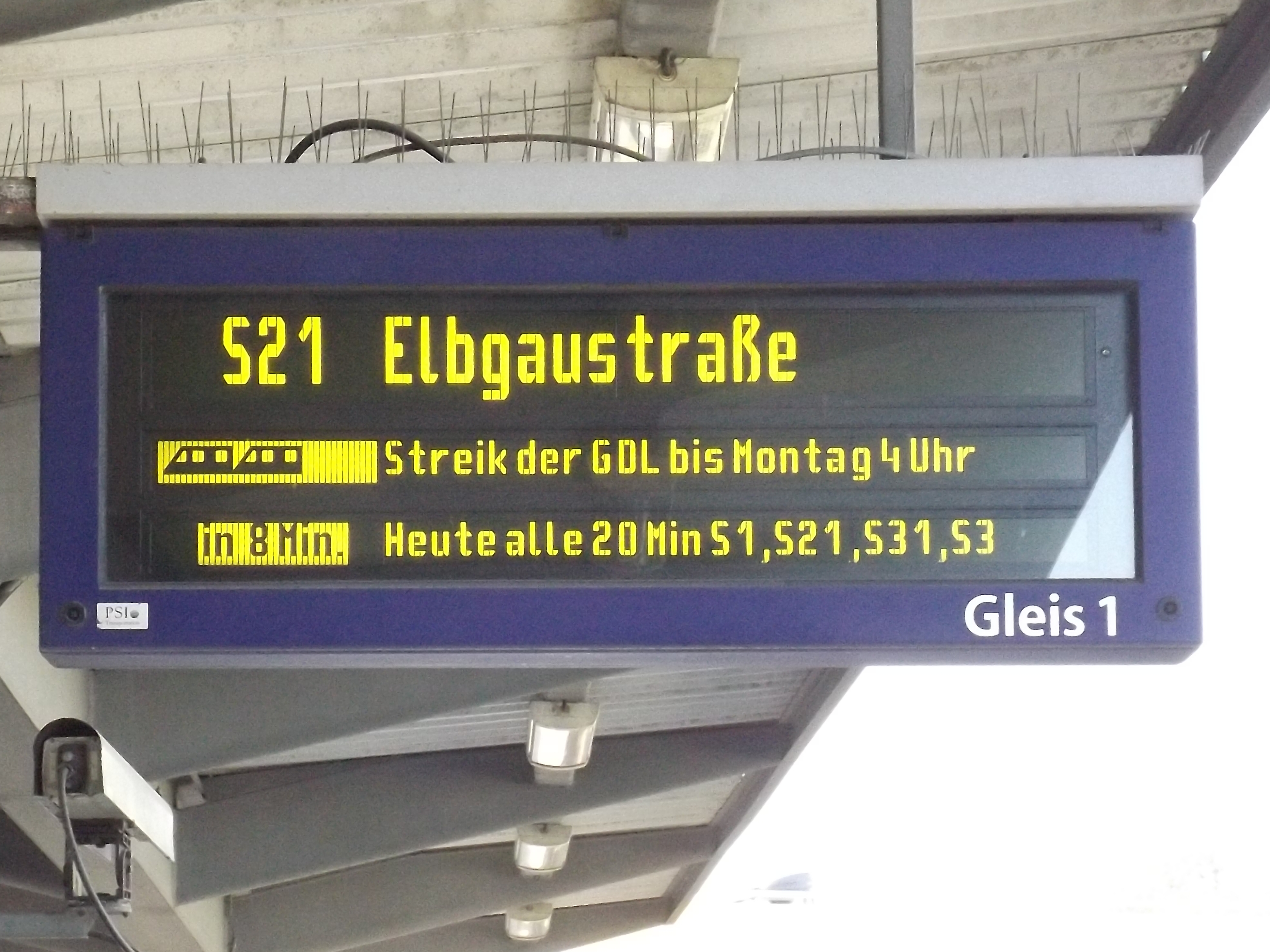 Anzeigetafel im S-Bahnhof Stellingen anläßlich des GDL-Streiks im November 2014